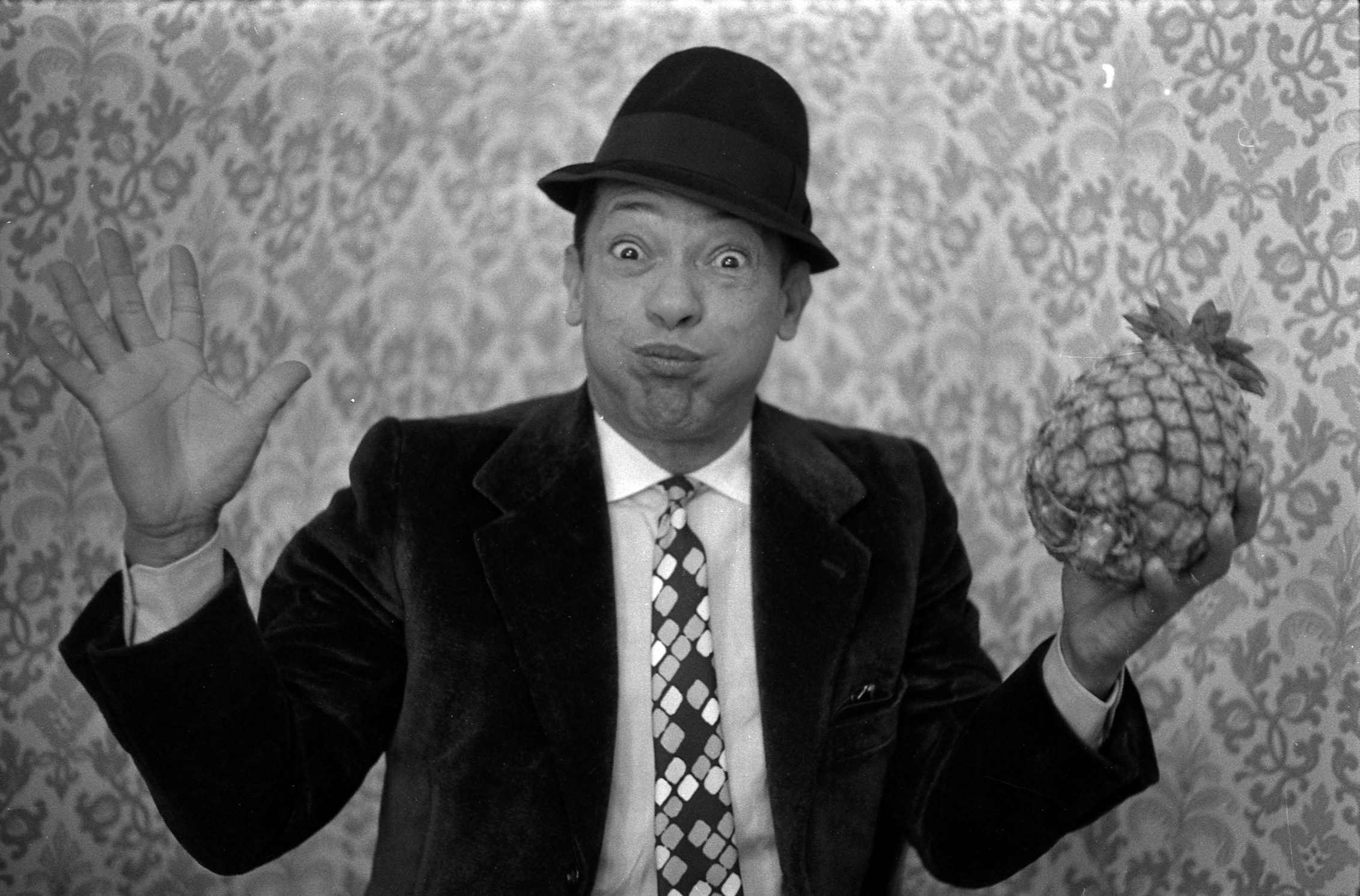 intérieur d'un appartement (ou hôtel) Toulousain. Le 17 mars 1970. Plan rapproché de face de l'acteur/chanteur Henri Salvador, bras écartés tenant dans sa main gauche un ananas et regardant, en faisant une grimace, le photographe, lors d'une interview pour la sortie de son film "Et que çà saute!". Observation: De passage à Toulouse,Henri Salvador présente son film en grande première avant Paris, "et que çà saute!". L'ananas qu'il tient entre ses mains, représente sur l'affiche du film, une bombe. D'ou les images où Henri Salvador s'amuse avec ce fruit.